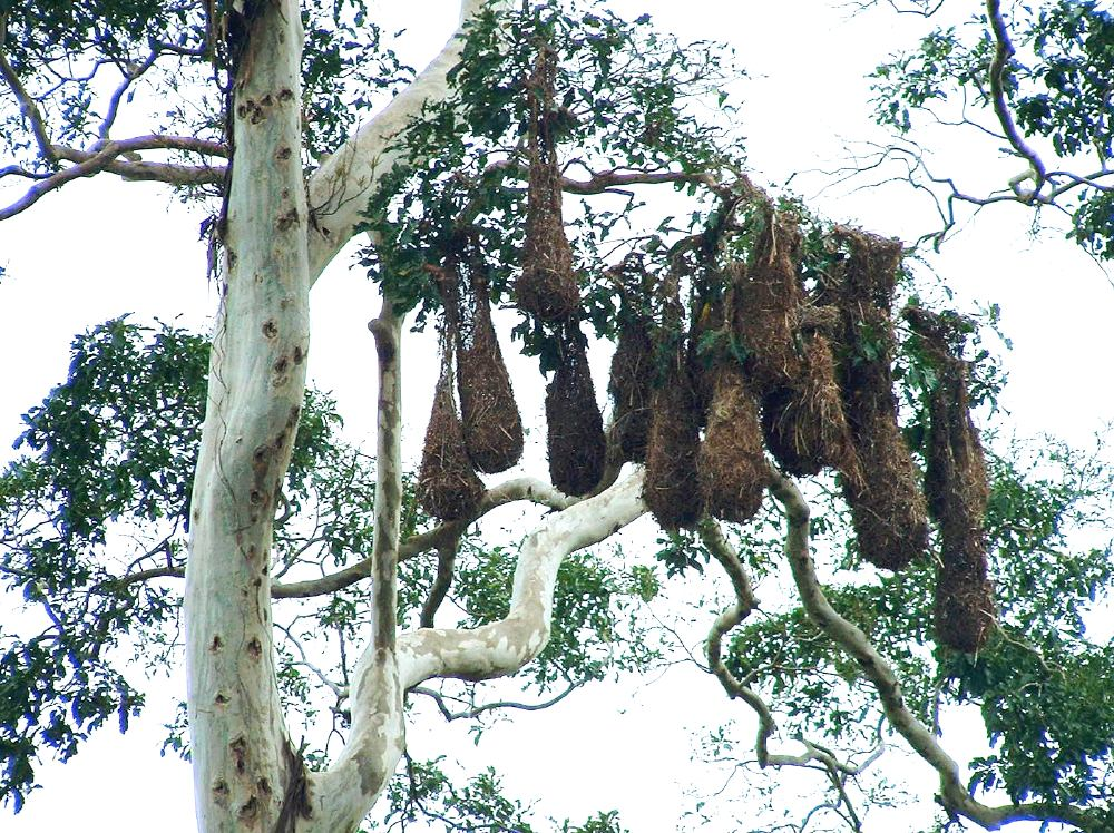 Nests of Montezuma Oropendula (Psarocolius montezuma), Alahuela Province, Costa Rica